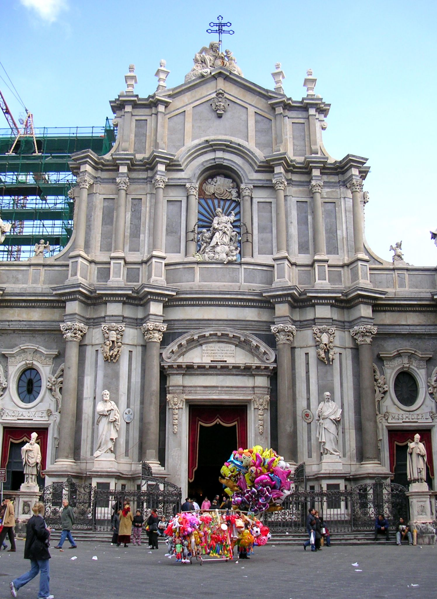 Facciata del Duomo di Catania.